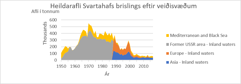 Heildarafli svartahafs brislings eftir veiðisvæðum